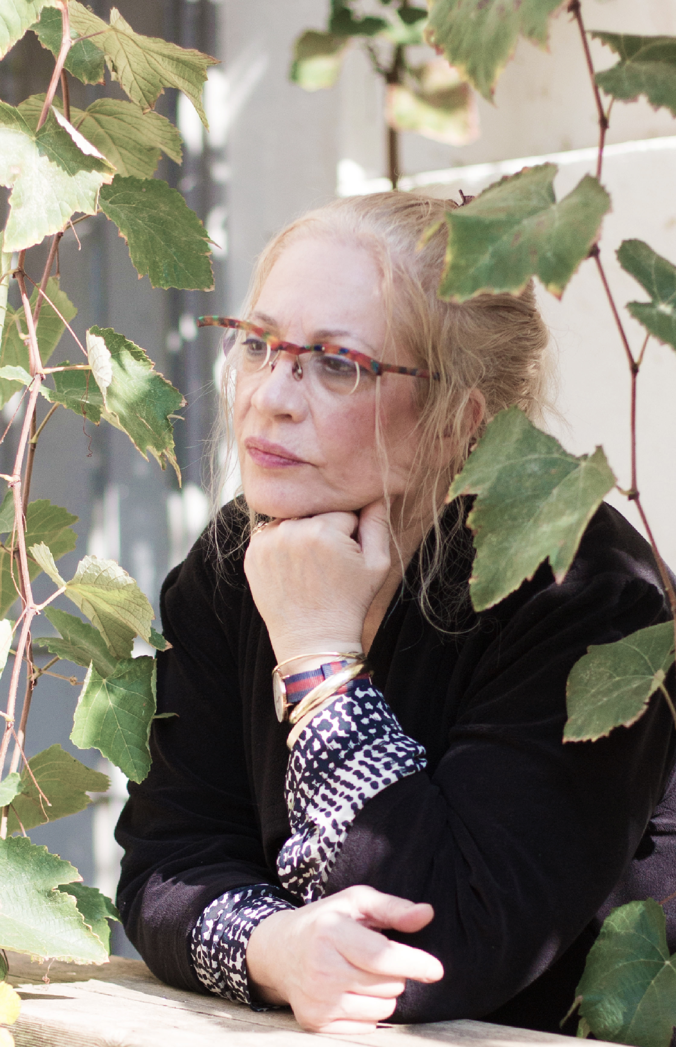 ליאורה קסלוב קיי